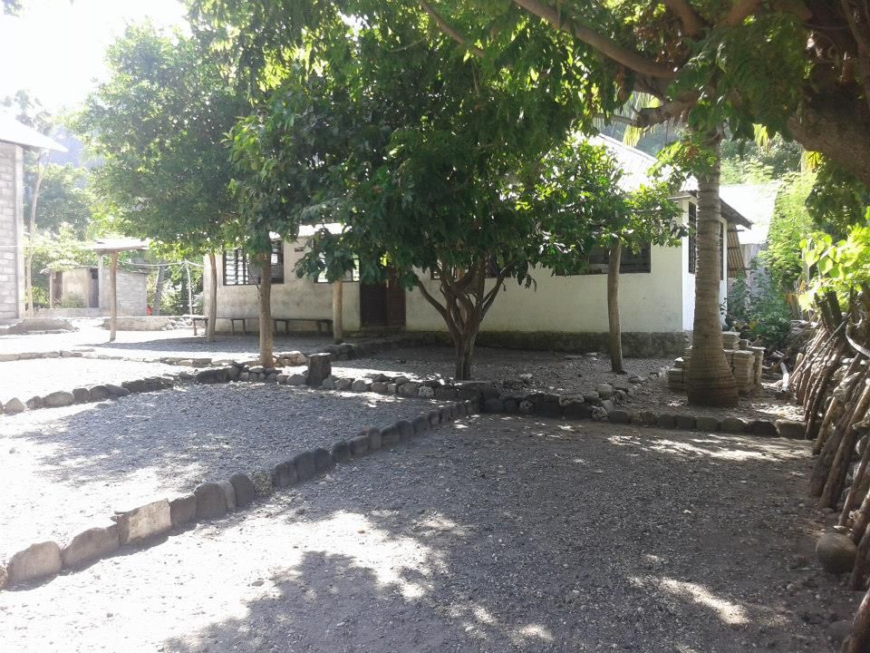 Atauro